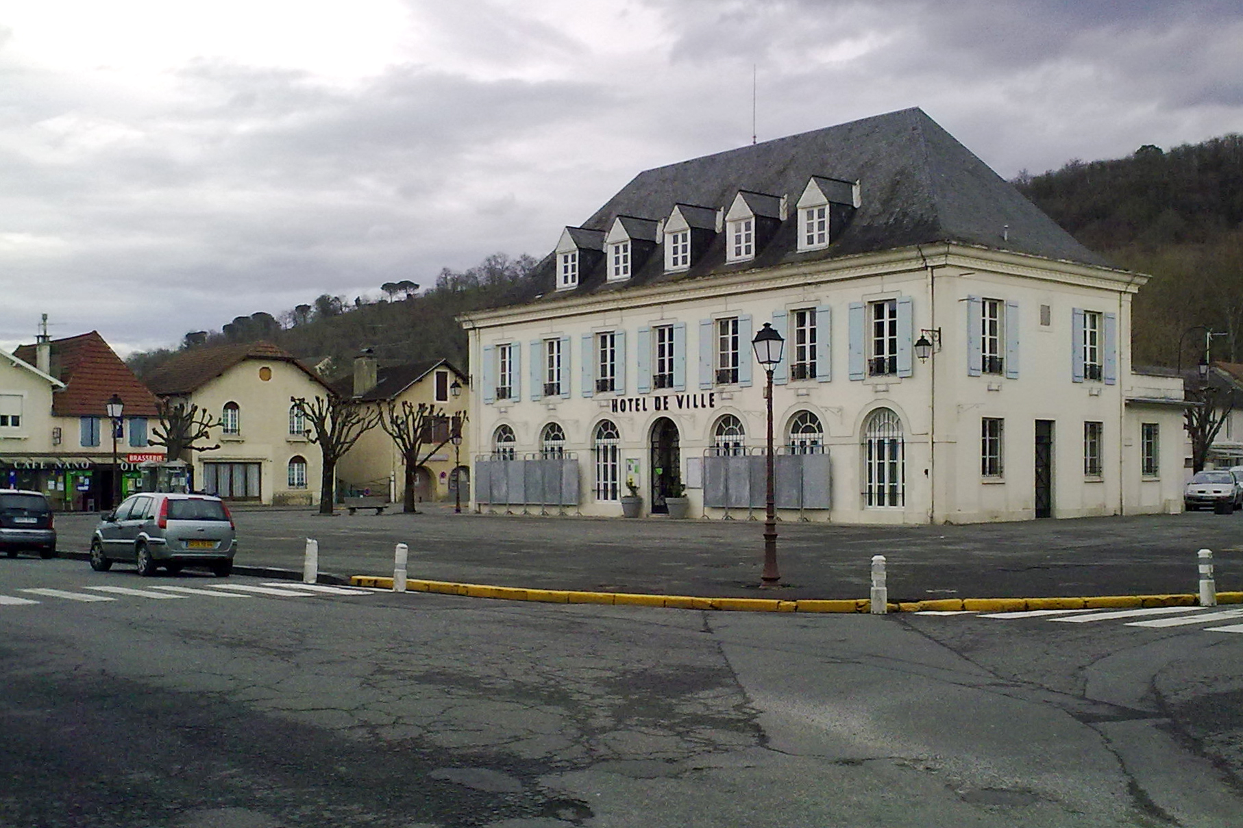 Mairie de Gan